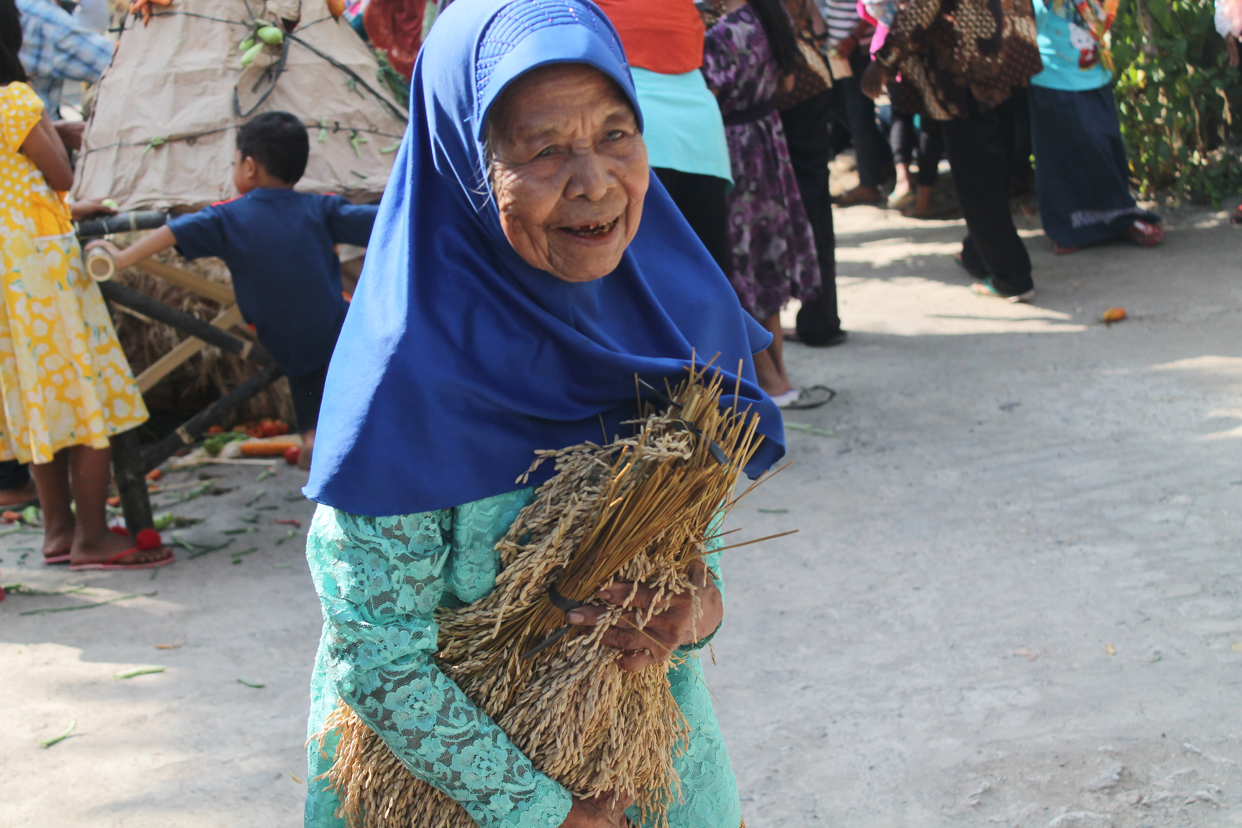 Warga berebut hasil bumi pada "gunungan" yang dibagikan dalam tradisi Rasulan di Kabupaten Gunungkidul.